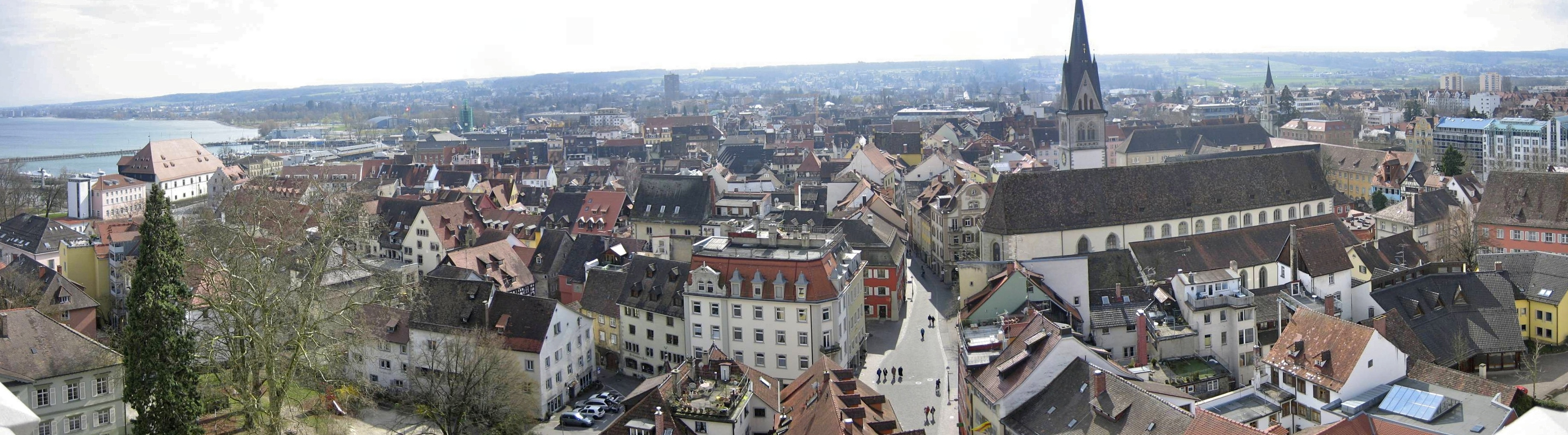 Die Konstanzer Altstadt vom Münster aus fotografiert. Links im Bild das Konzilgebäude.